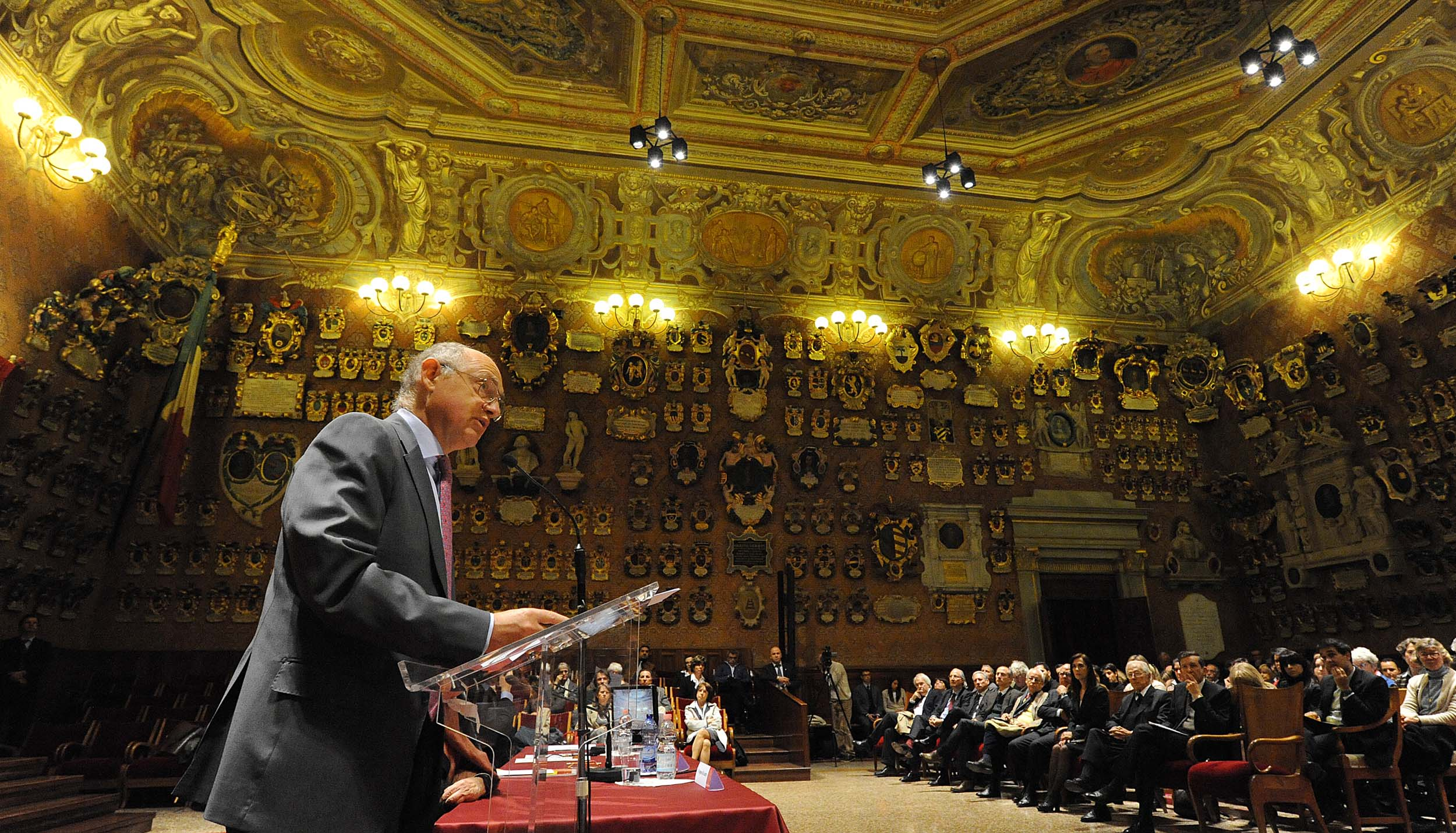 Padua, Italia, 20/04/2012. El Canciller Timerman participó en el acto de reconocimiento a Néstor Kirchner en la Universidad de Padua por su compromiso con los Derechos Humanos.